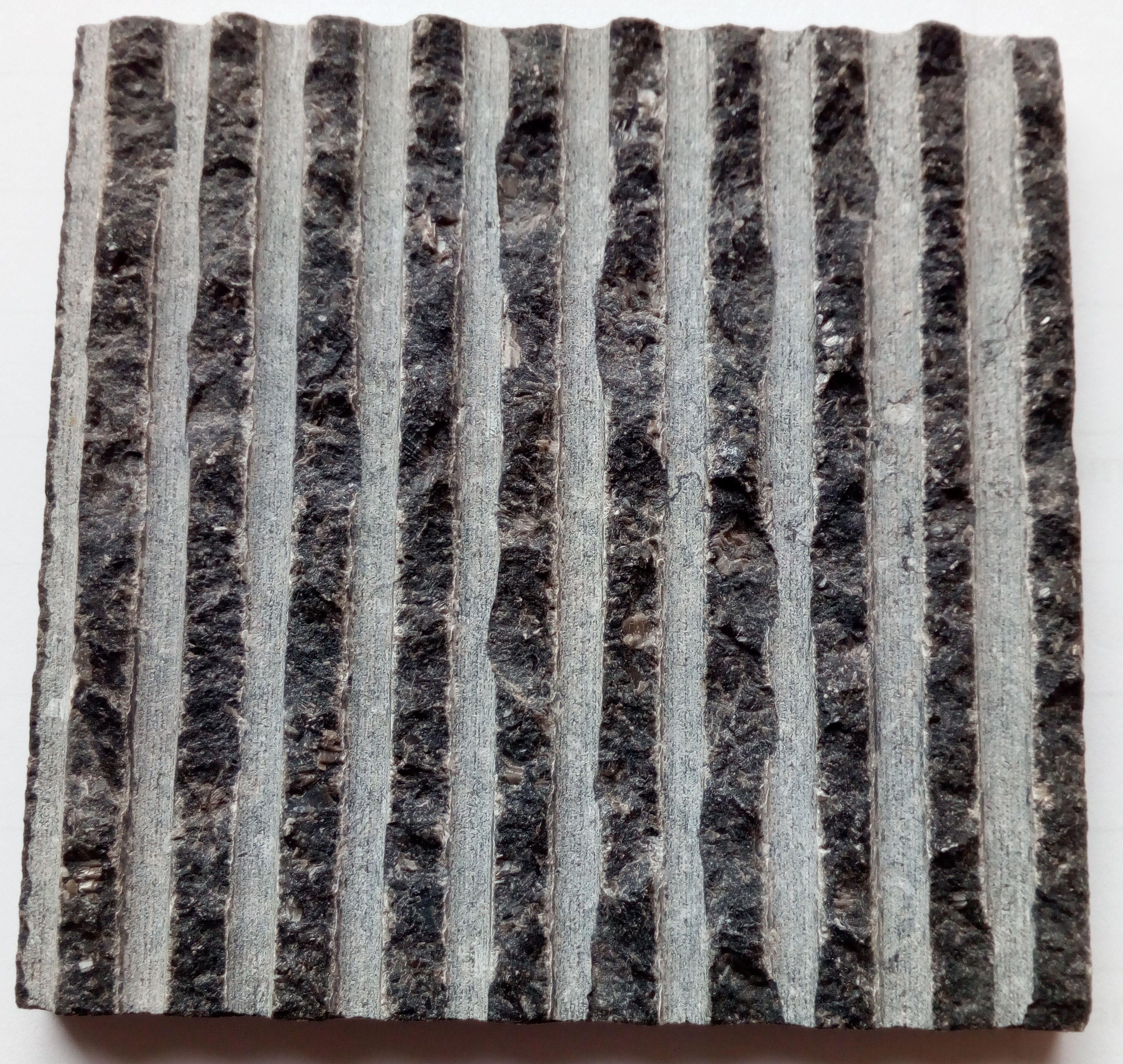 Gegradineerde blauwsteen voor